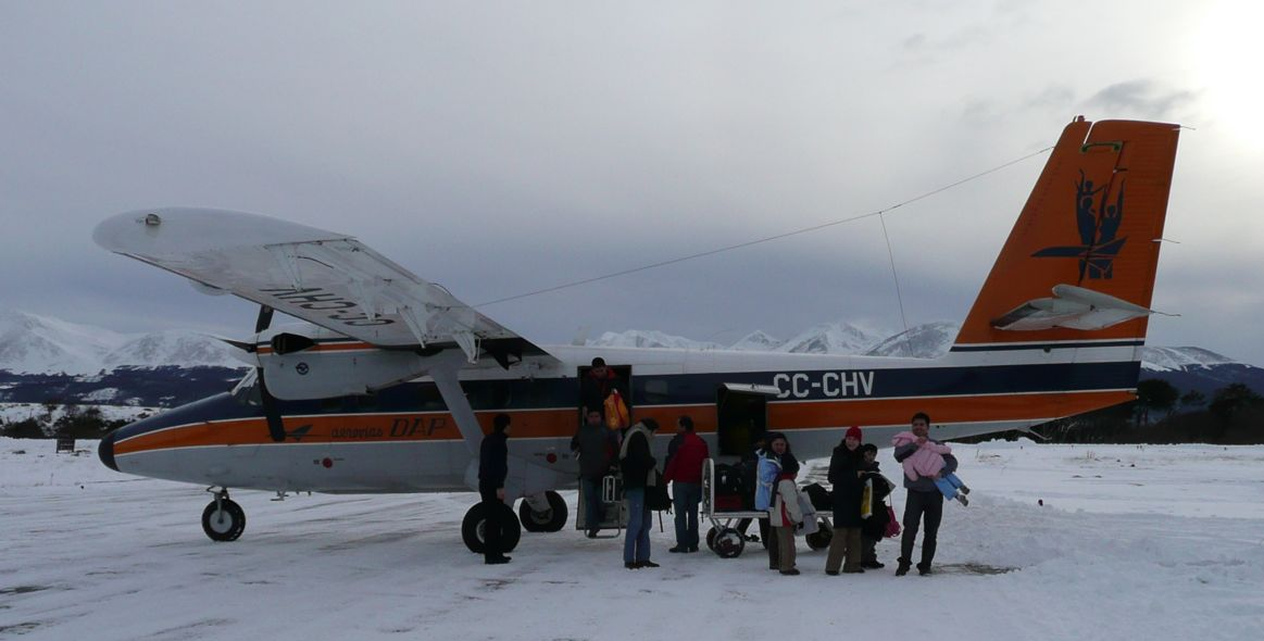 Twin Otter de Aerovías DAP